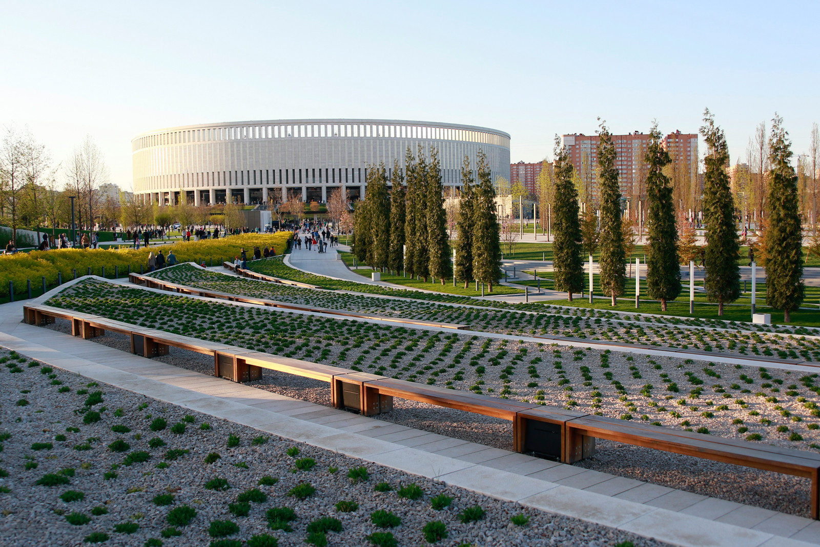 «Краснодар», который заслужил аплодисменты